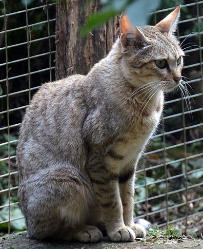 Chat de Gordoni (Felis silvestris gordoni) au Parc des Félins (Lumigny-Nesles-Ormeaux, 77, France).